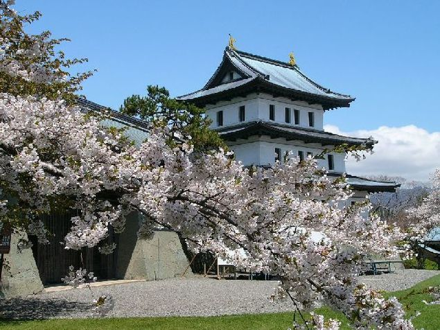 松前城の桜